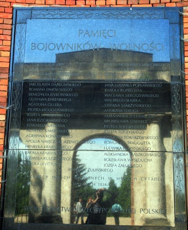 Warszawa (Polska)